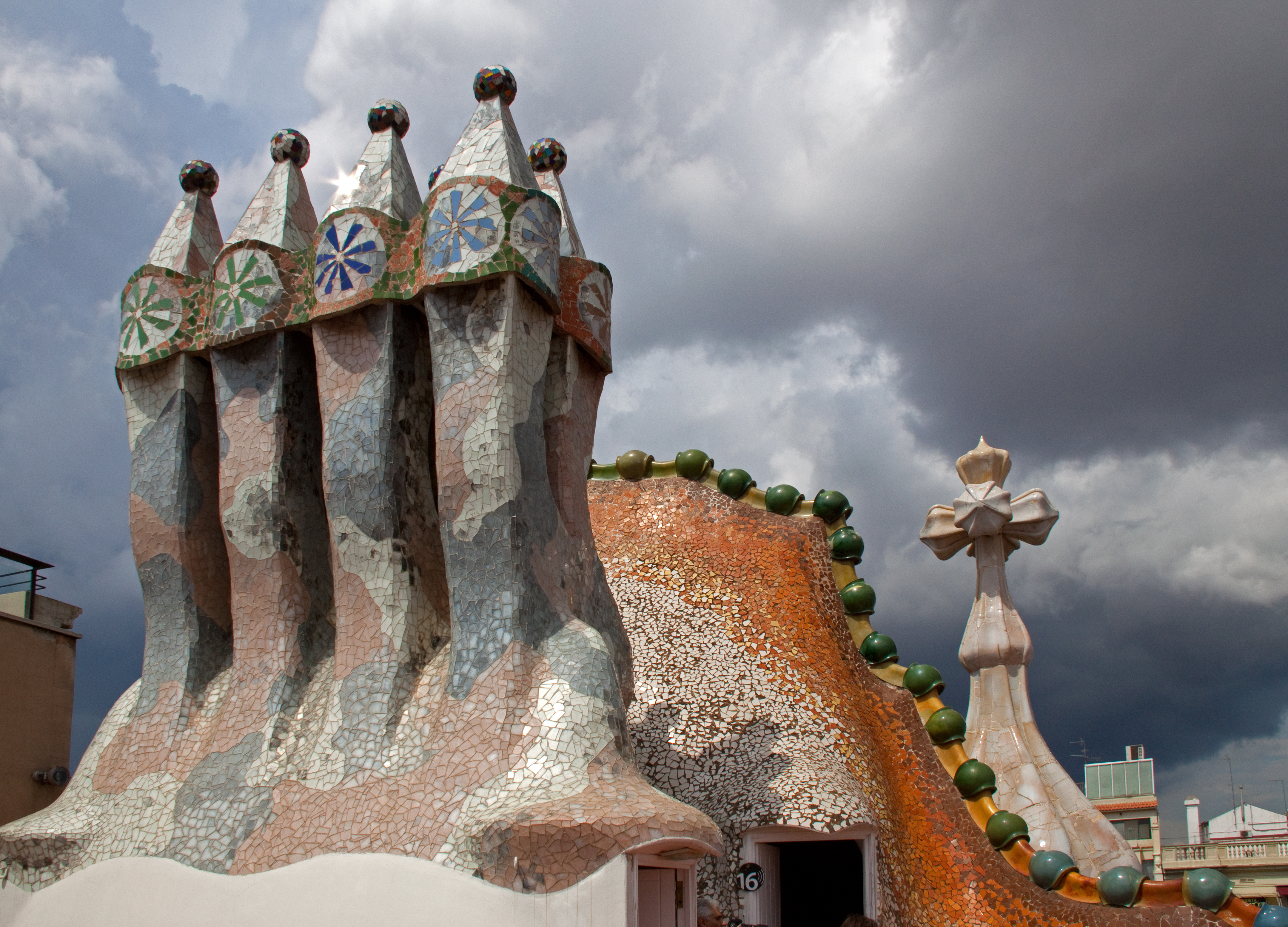 Terrat de la casa Batlló (1904-1906), obra d'Antoni Gaudí (Barcelona, Catalunya). Un dels 4 grups de xemeneies que té l'edifici, en la base de la qual està l'escala d'accés al terrat. Darrera hi ha el coronament en forma d'espinada de drac dins del qual s'allotjaven els dipòsits d'aigua. AL fons, la torre rematada amb una creu que és un element clau de la façana principal.